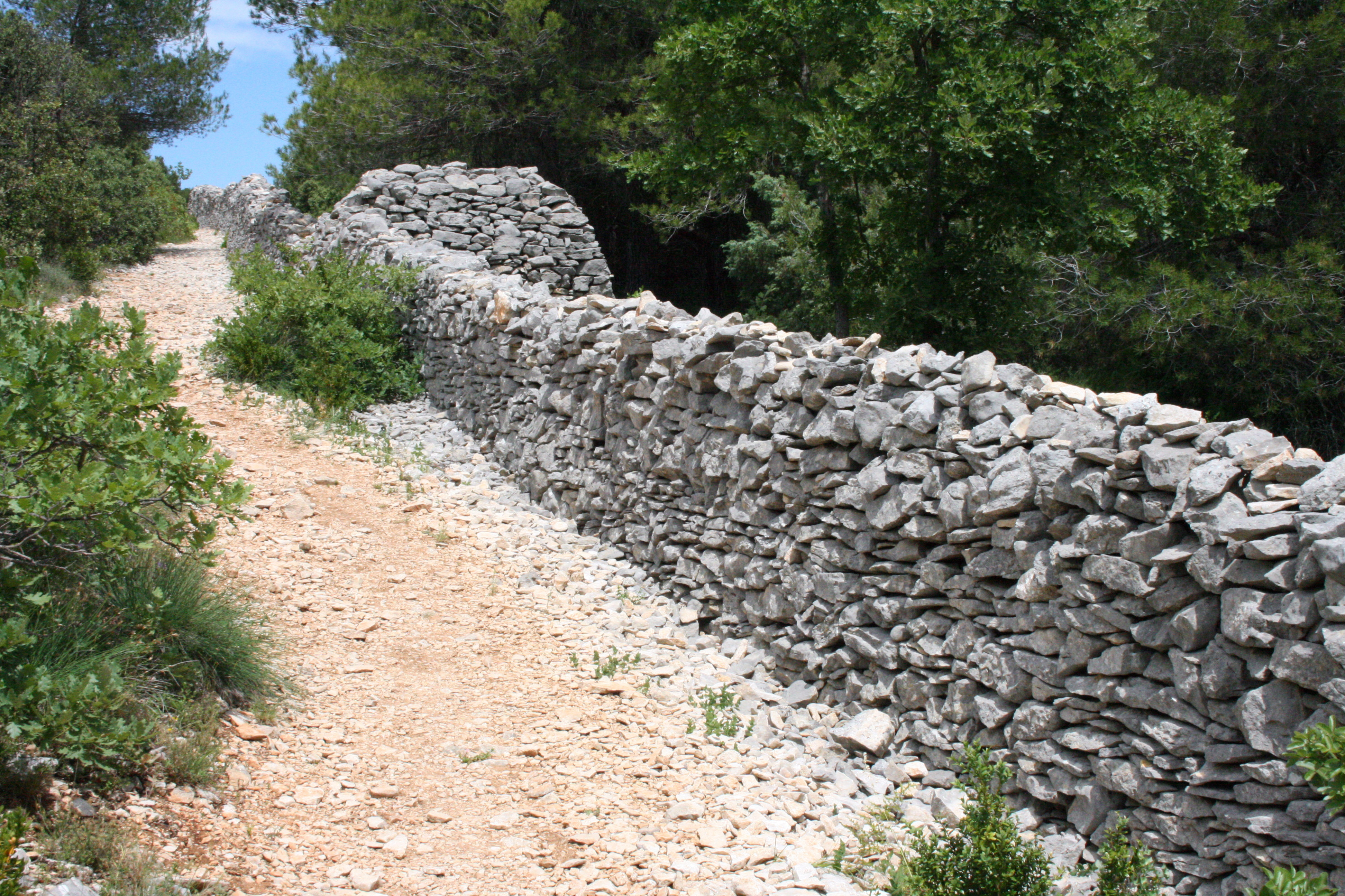 Mur de la Peste (1721). Cabrières-d'Avignon, département du Vaucluse (France)